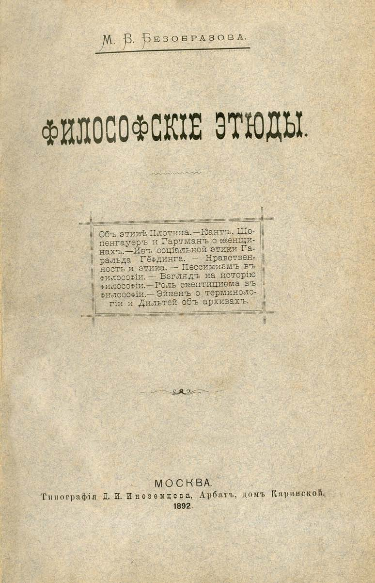 "Философские этюды", книга М. В. Безобразовой. Москва, 1892 г.